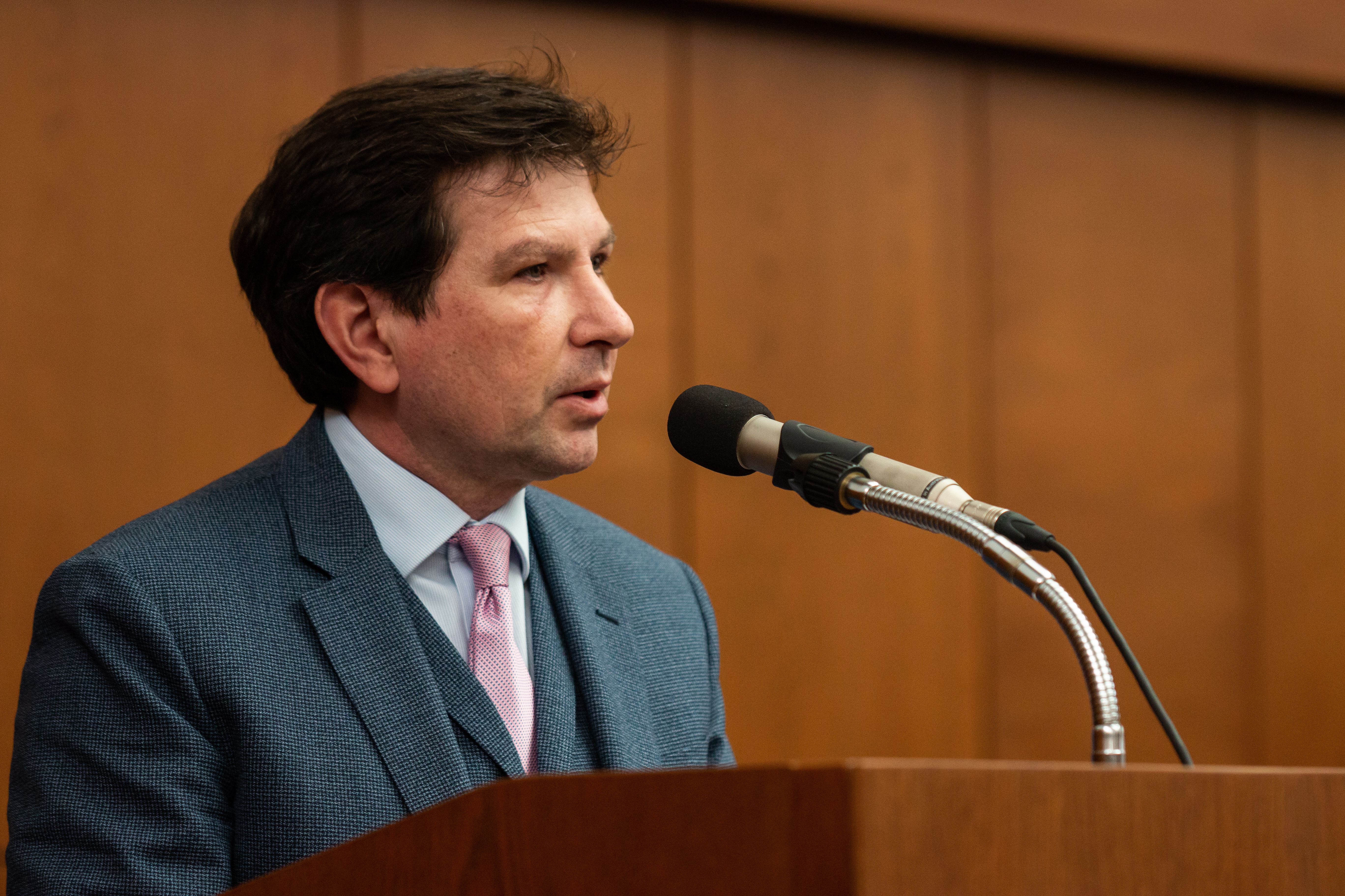 Martin Bareš povede Masarykovy univerzitu od září 2019 do srpna 2023.